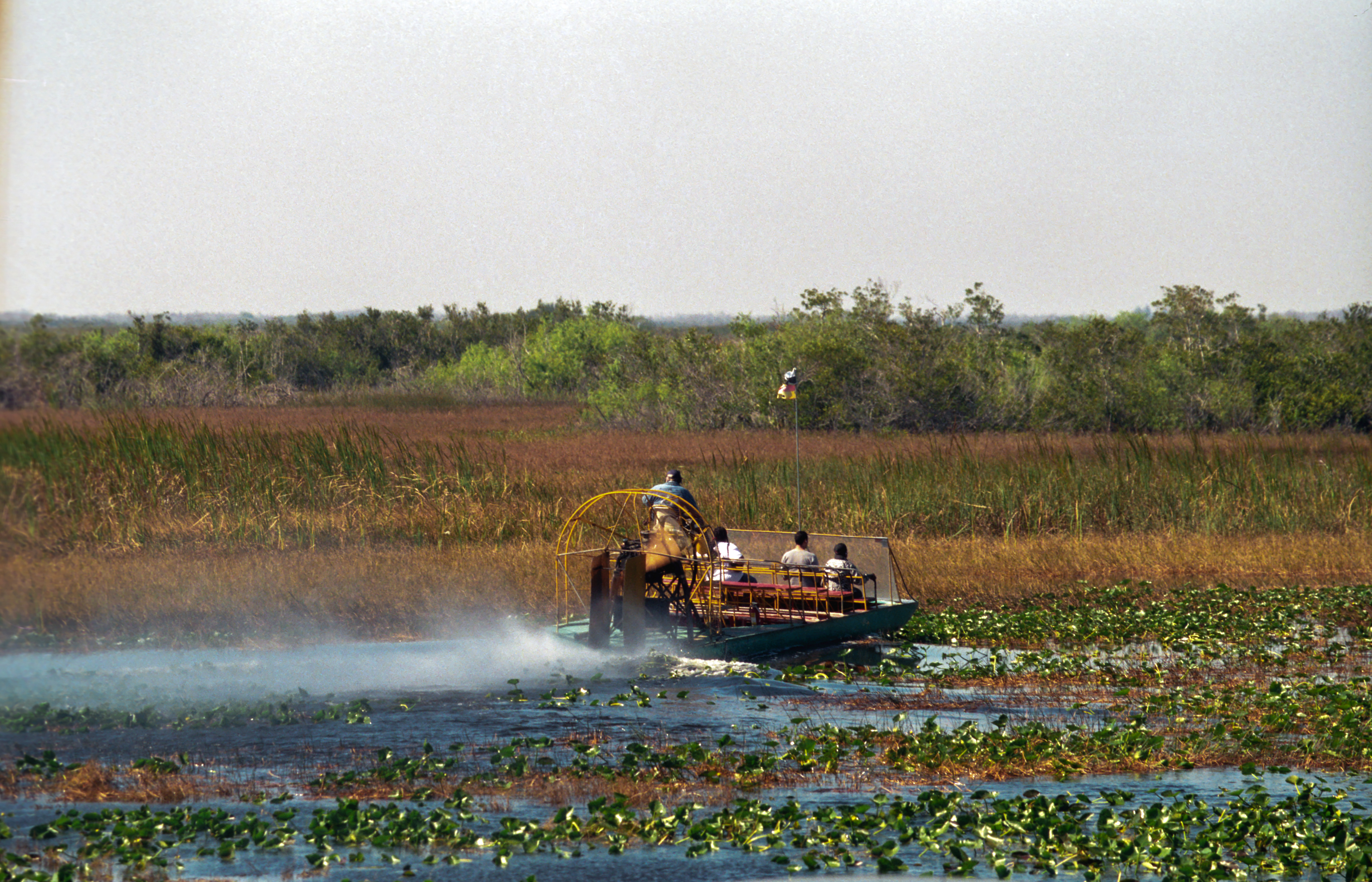 Bagna Everglades